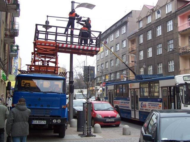 Pojazd wieżowy-Star 1142. PKT Gdynia